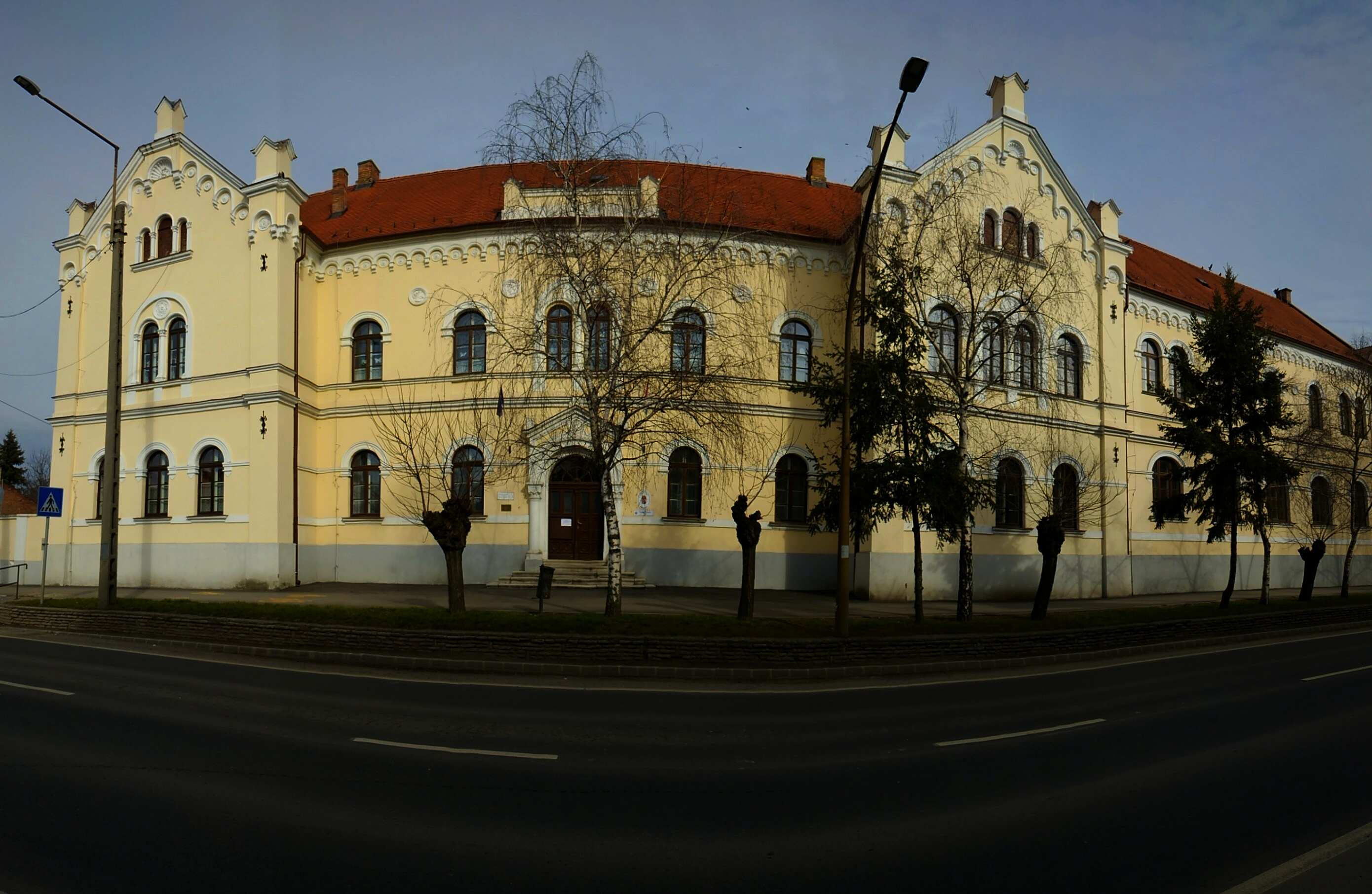 Jászberény Nagyboldogasszony Kéttannyelvű Katolikus Általános Iskola 2020